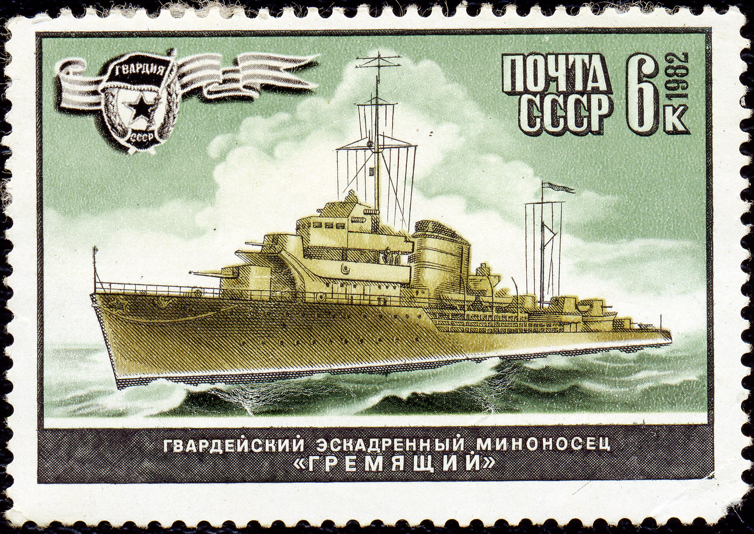 Почтовая марка СССР. 1982. Гвардейский эскадренный миноносец Гремящий CPA # 5335